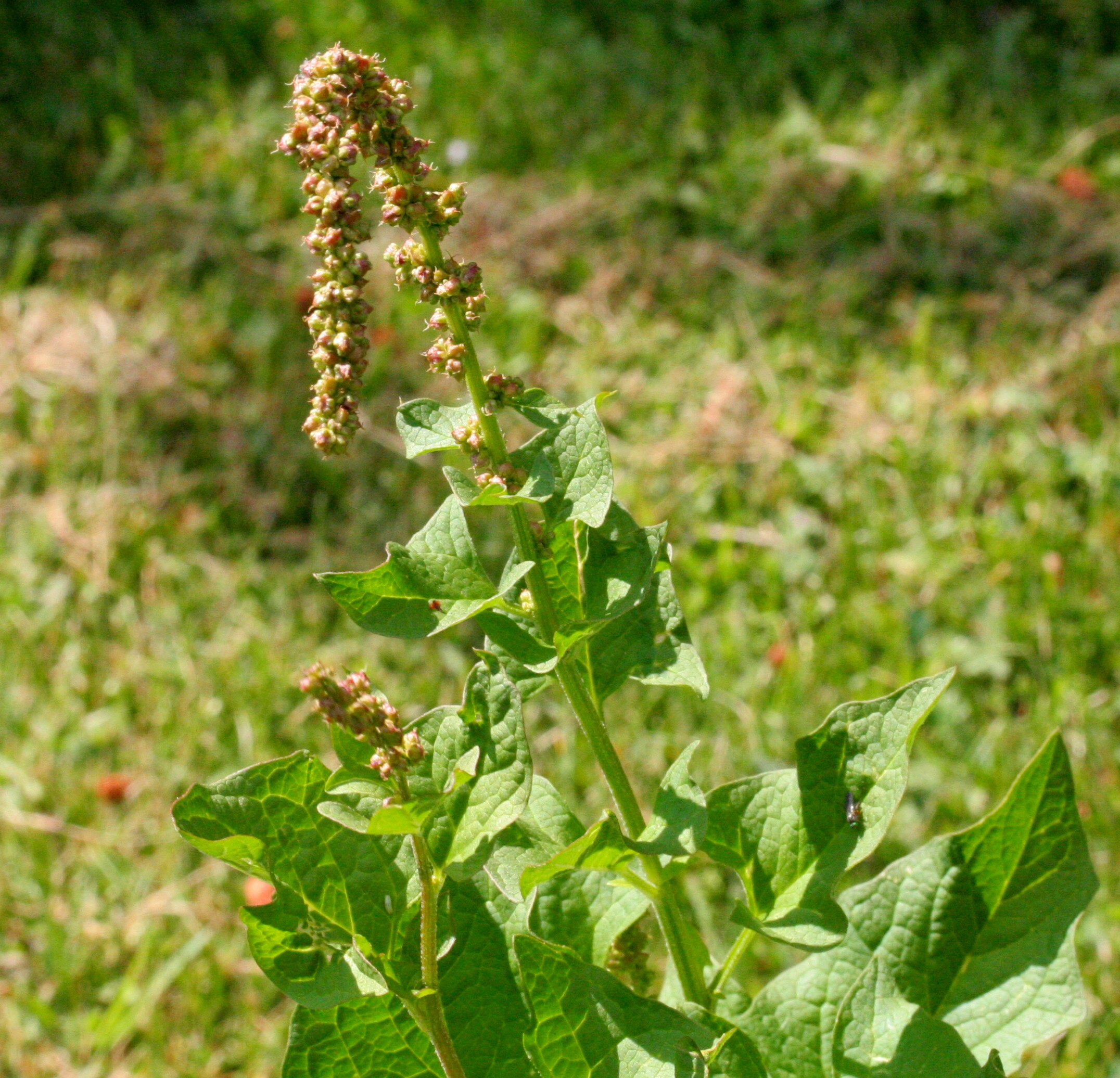 Farinello buon-enrico - Località : Giardino Botanico Alpino "Giangio Lorenzoni", Pian Cansiglio, Tambre d'Alpago (BL), 1000 m s.l.m.